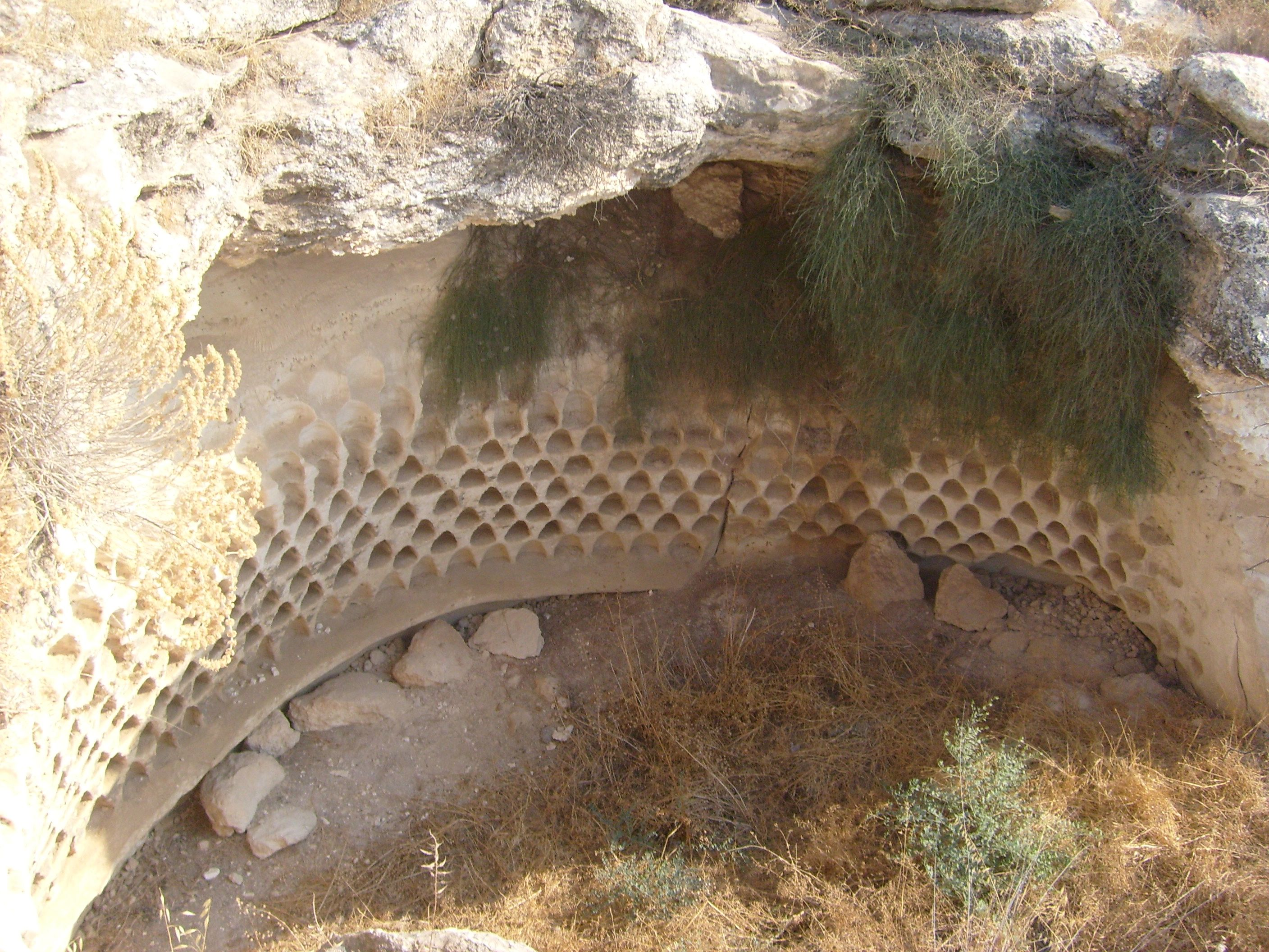 מערת קולומבריום בלוזית